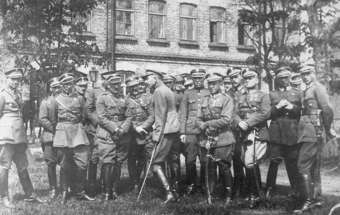 Garnizon Przasnysz 1921, dowódca 7 Pułku Ułanów mjr Zygmunt Piasecki wśród kadry pułku